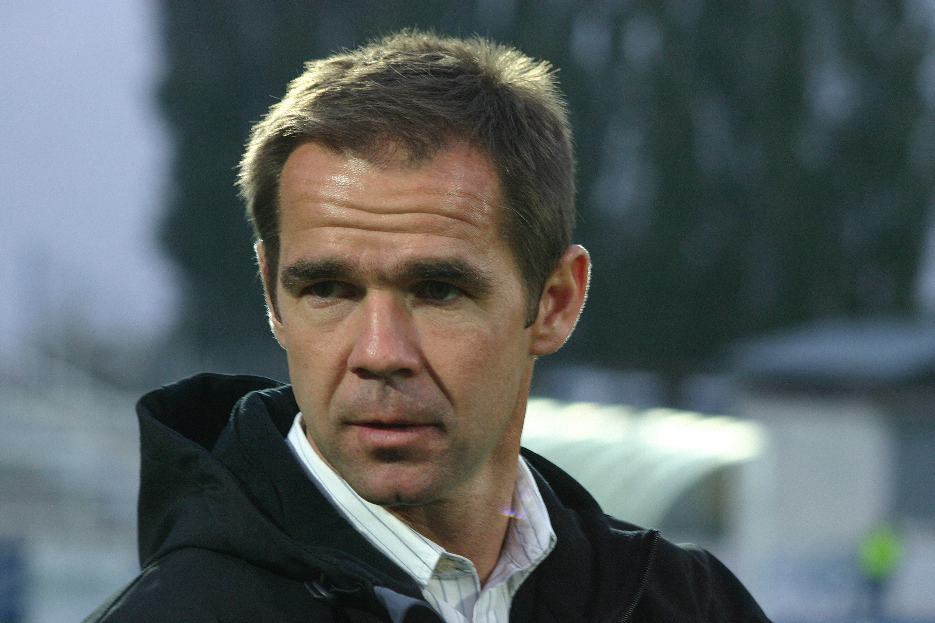 Heimo Kump, Trainer (DSV Leoben) (Bild 2)